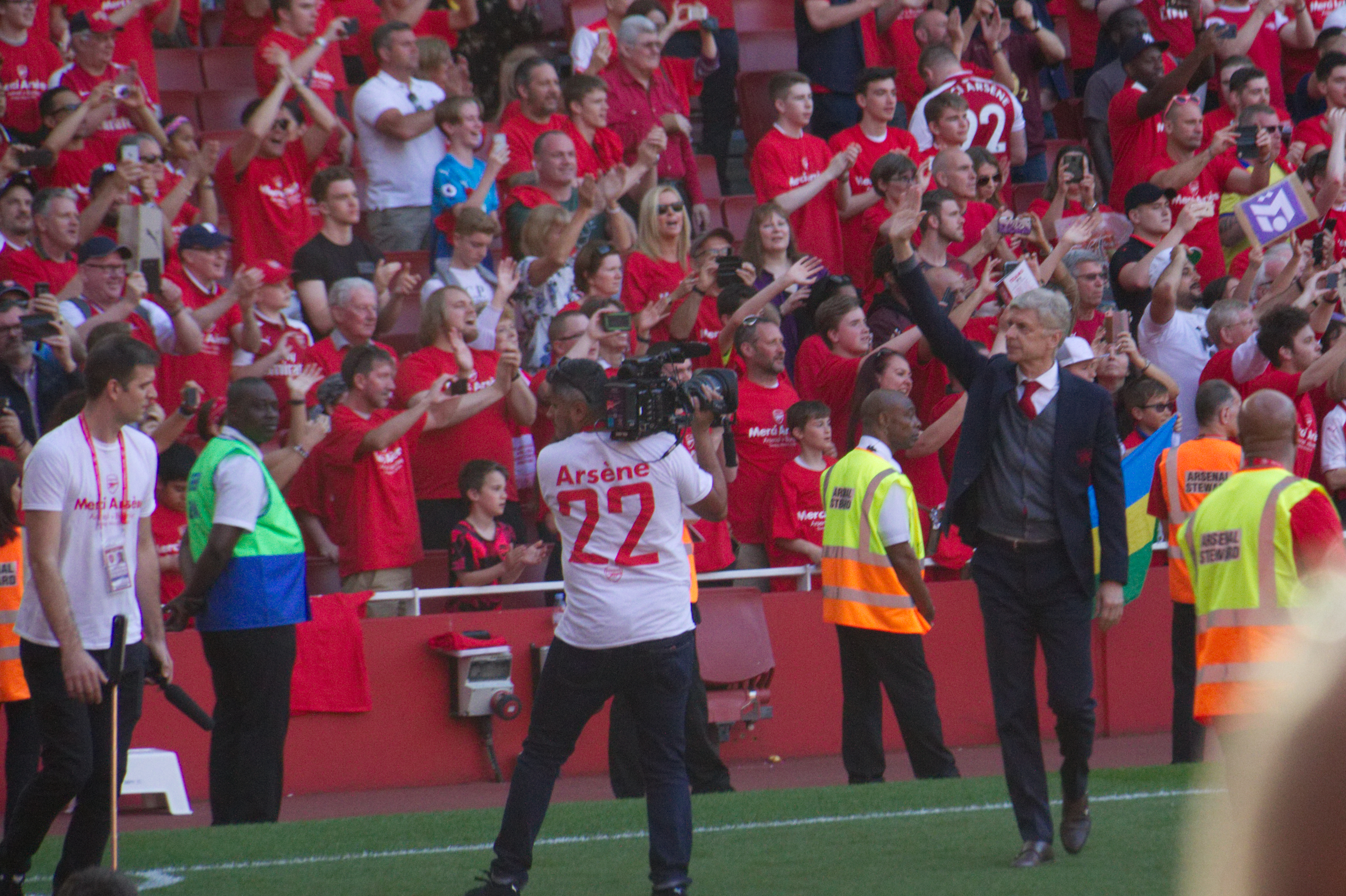 42 Merci Arsène - Goodbye Arsène!